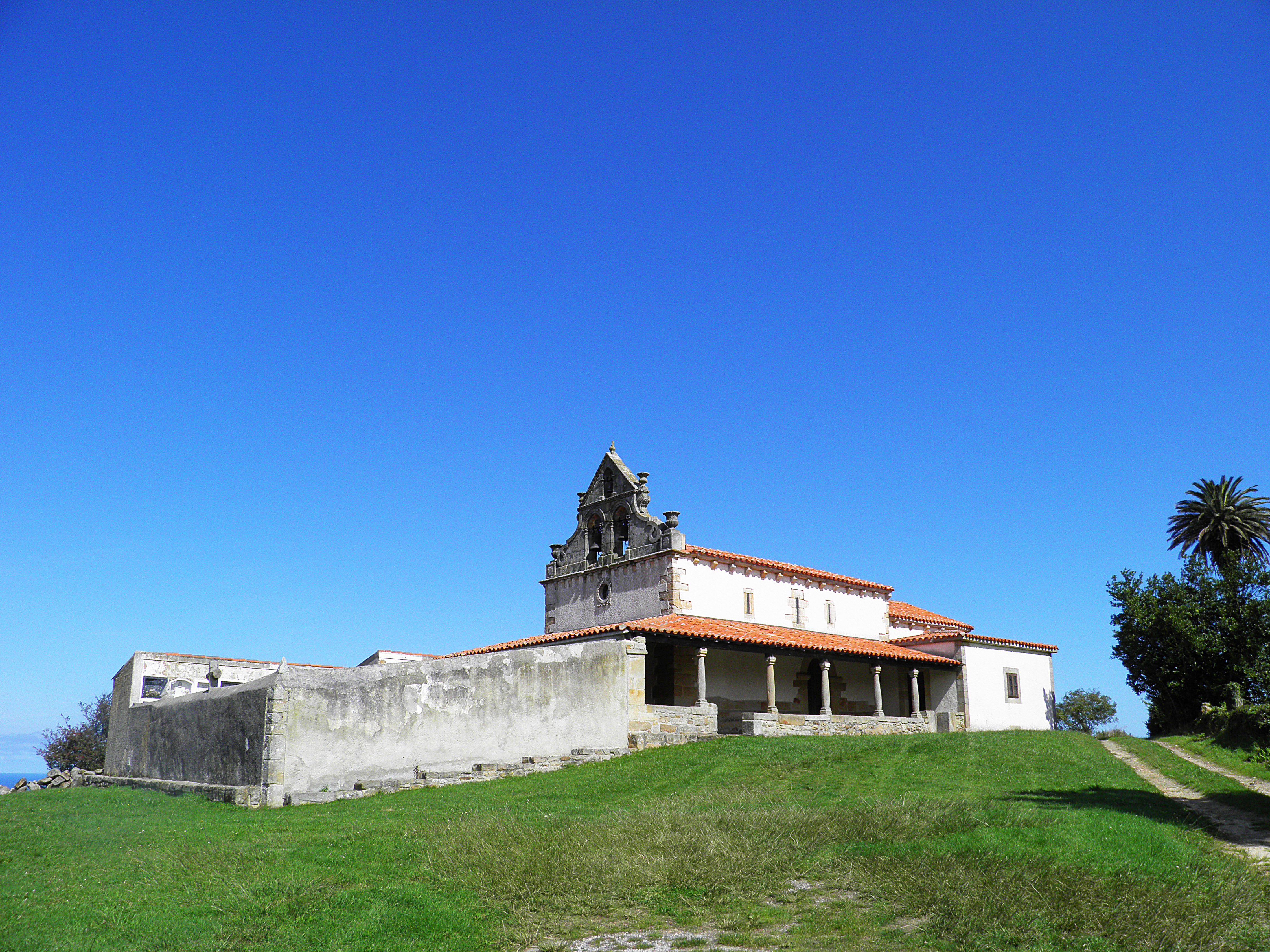 Oles (Villaviciosa, Asturias)